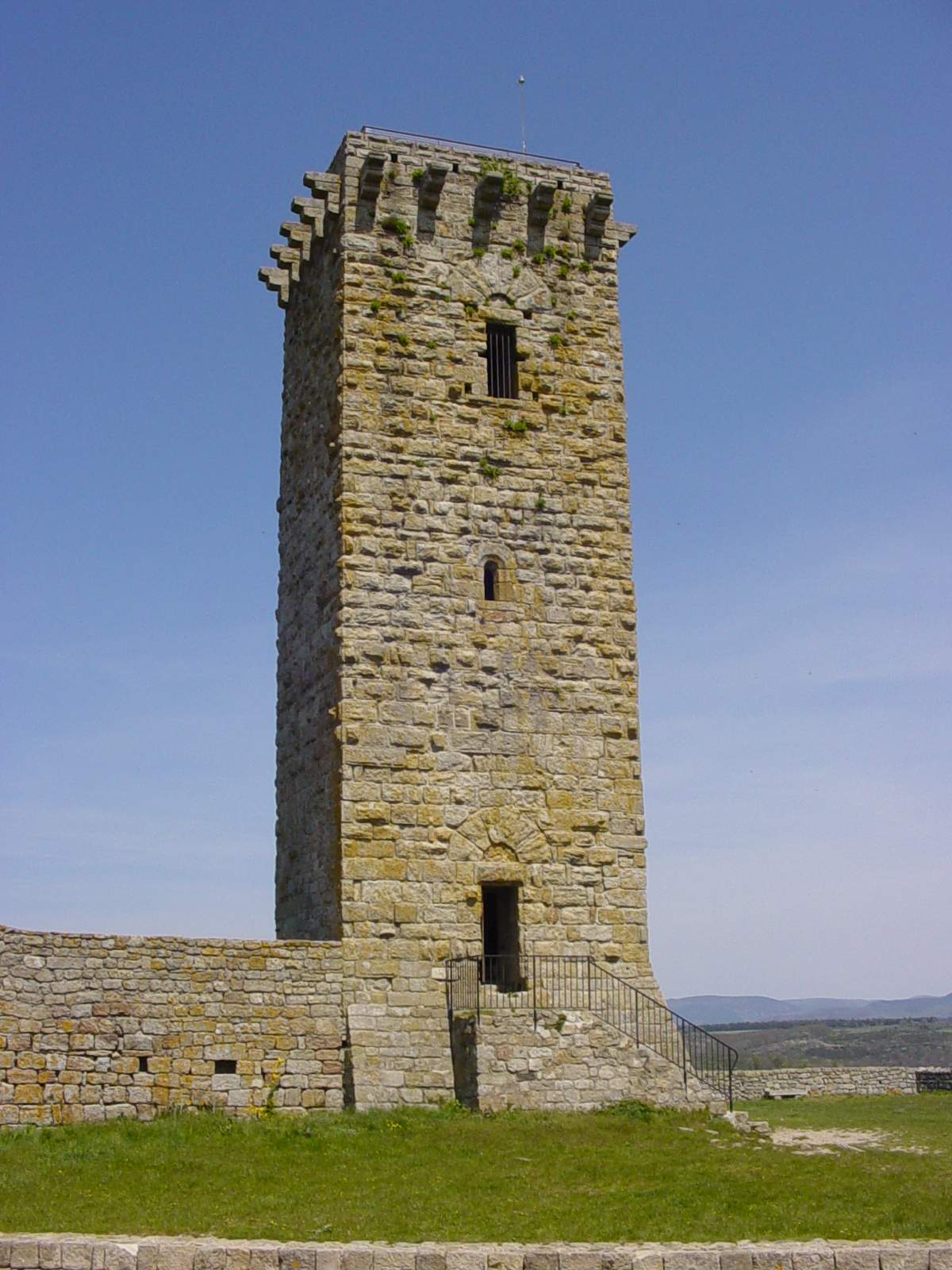 Tour de la Garde Guérin. Association GARDE